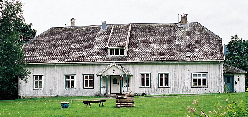 Flesberg prestegard. 1800-tallet. Freda 1991. (NOTE: The current porch appears to date from 1900, and the front door is modern. AJM)